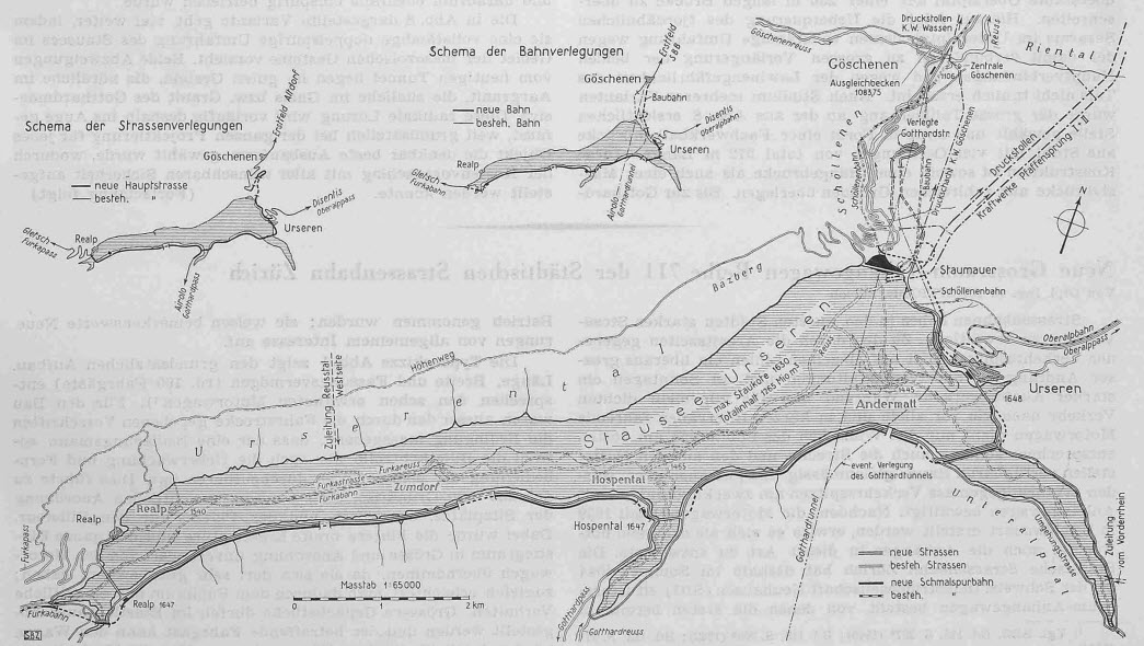 Nicht realisierter Stausee im Urserental für das Urserenkraftwerk-Projekt. Geplante Verlegung der Verkehrswege